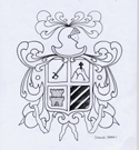 Template:Dibujo realizado por Daniel Marsà i Vilà